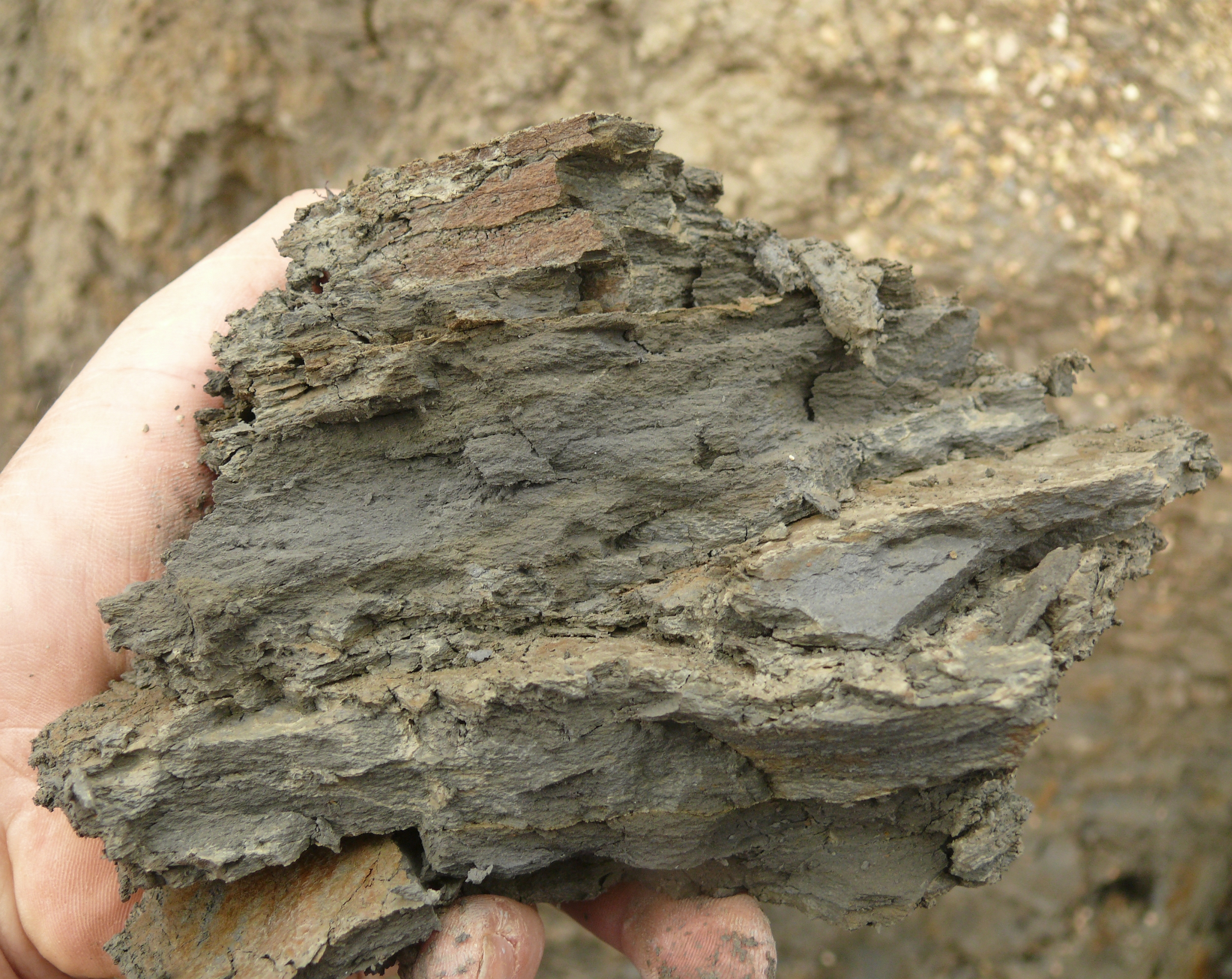 Obtususton, Oberes Sinemurium, Unterer Jura Baugrube in Hüttlingen